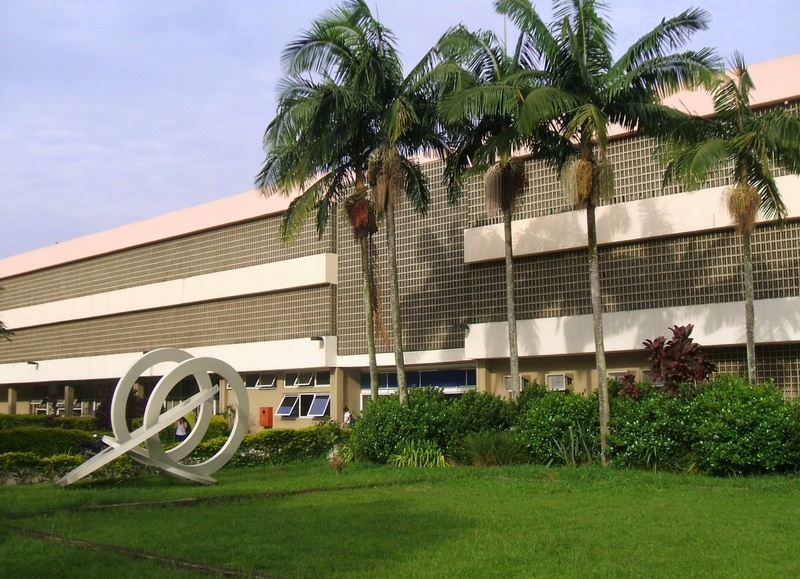 Fachada da Escola de Comunicações e Artes da Universidade de São Paulo.